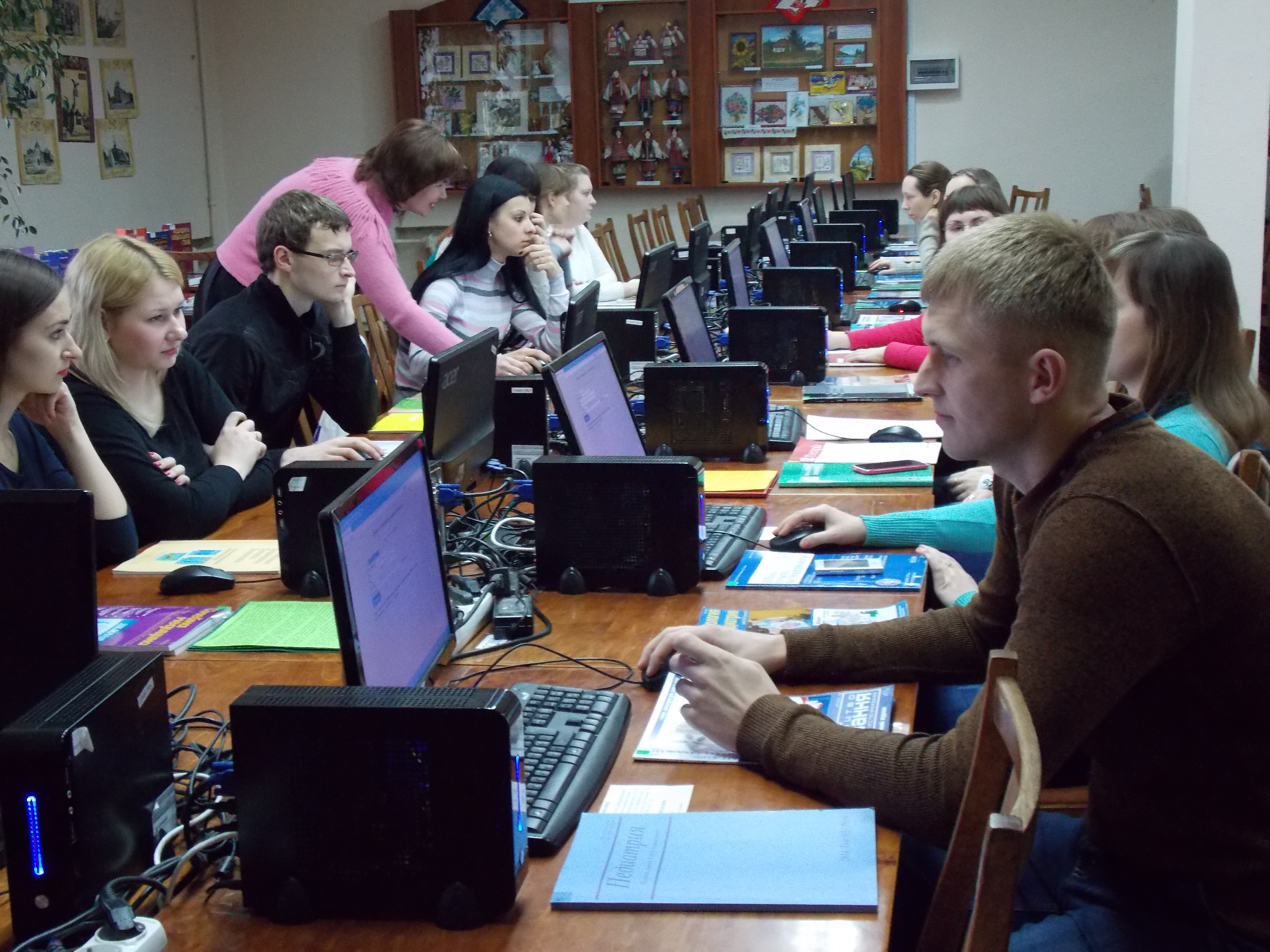 Центральна читальна зала бібліотеки